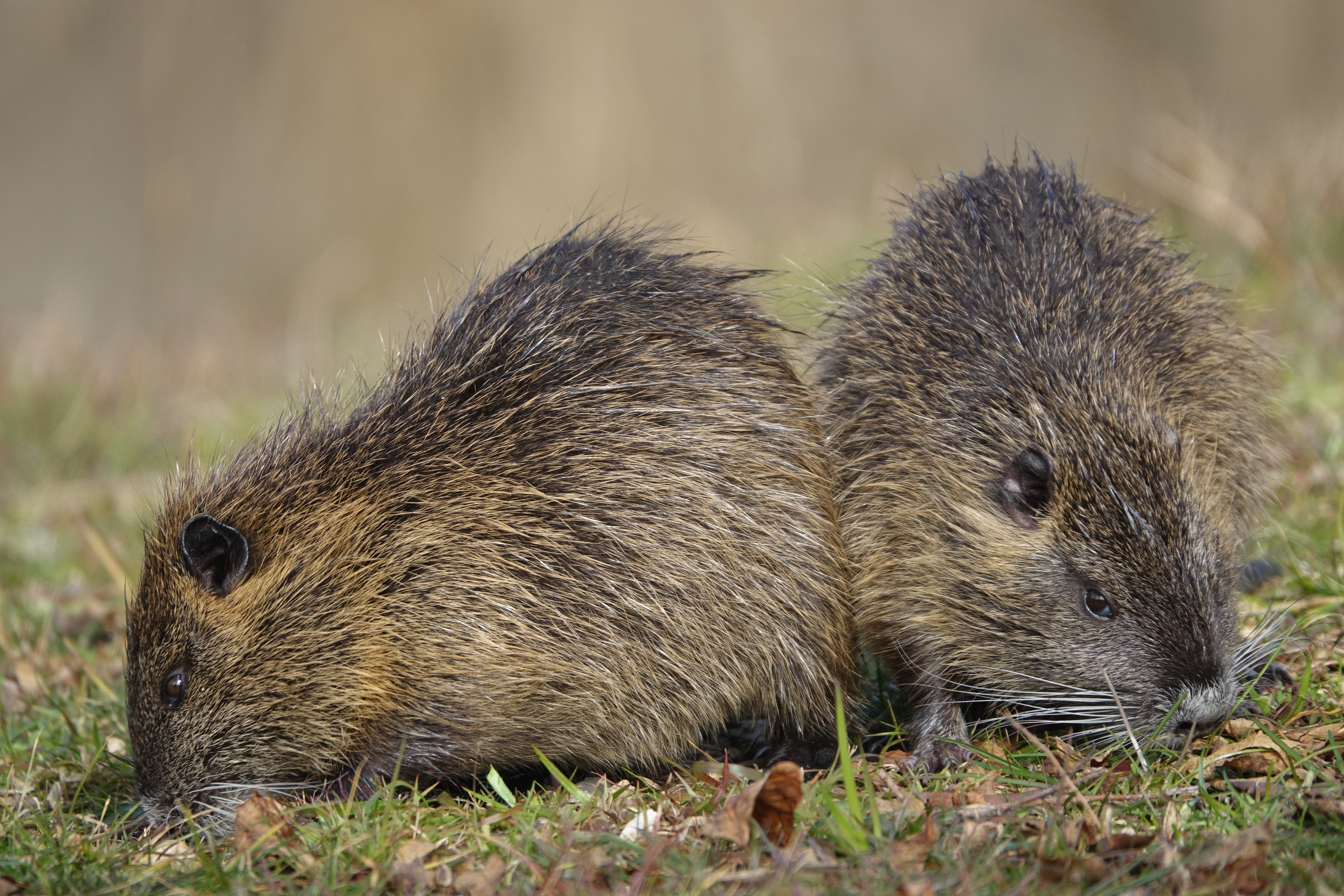 ヌートリアのつがい 日本東海地方